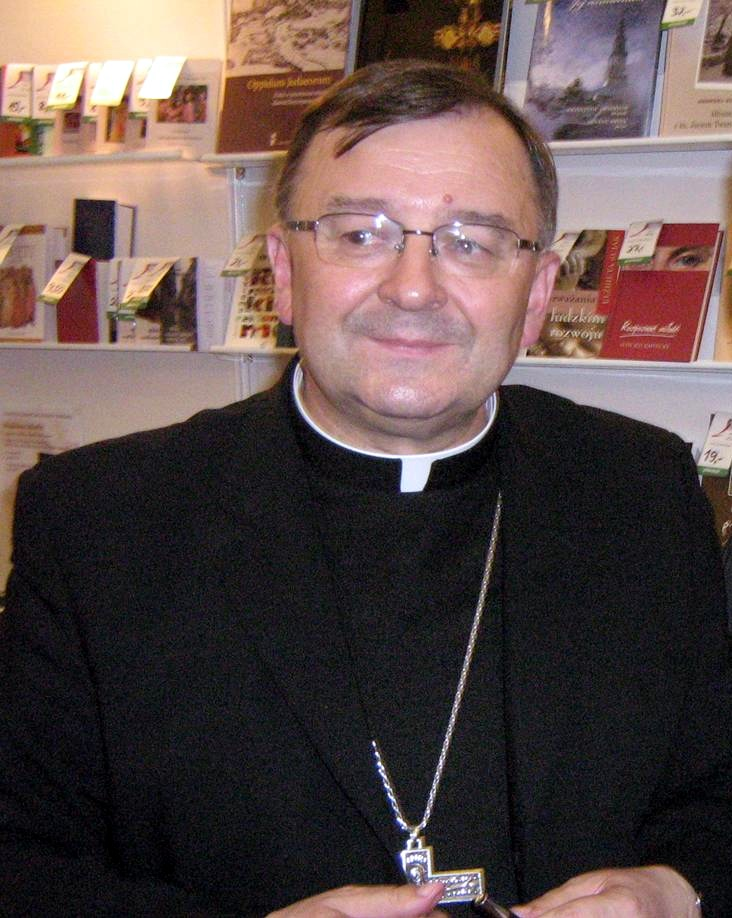 Józef Mirosław Życiński (ur. 1 września 1948 roku w Nowej Wsi koło Piotrkowa Trybunalskiego) - arcybiskup metropolita lubelski, duchowny katolicki, filozof, teolog, publicysta.